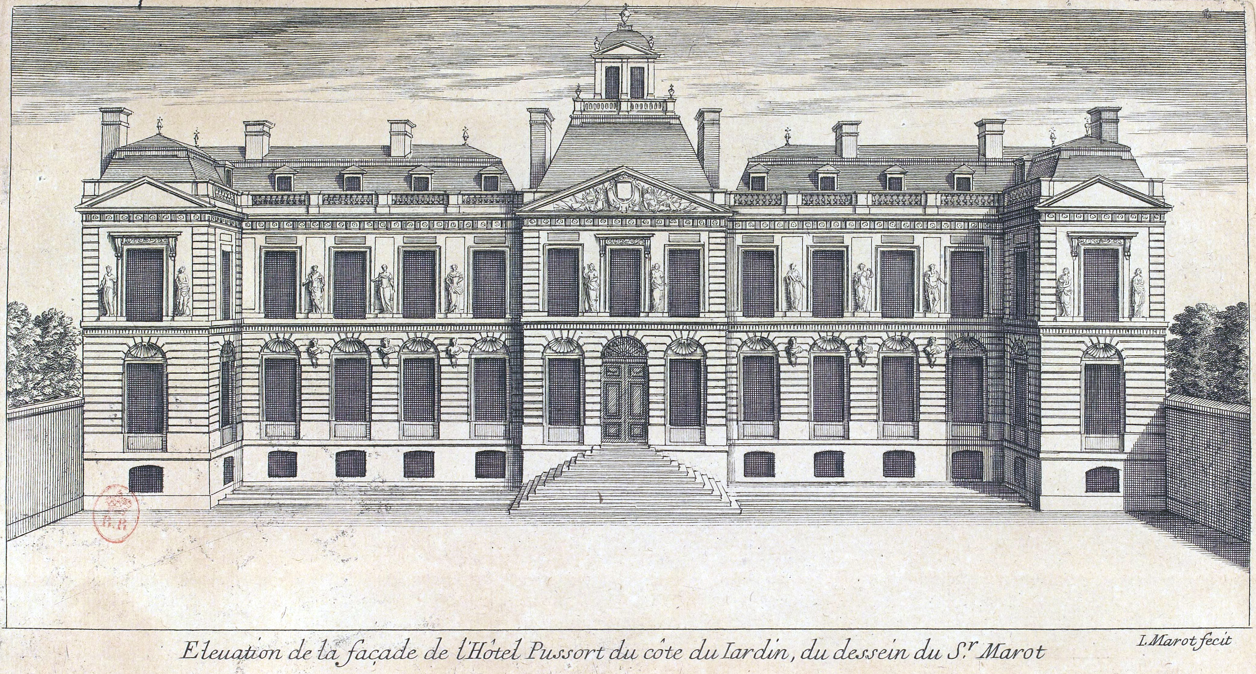 Hôtel Pussort, Elévation de la facade du côté du jardin, plate from Jean Marot's L'Architecture française